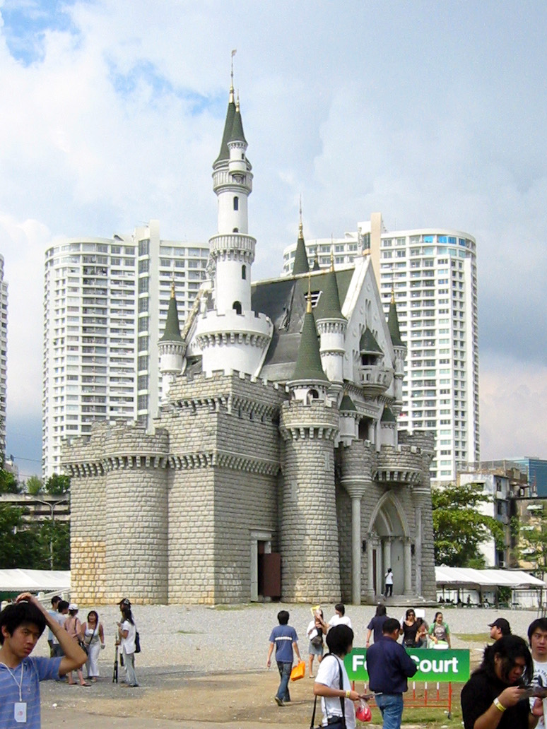 รู้สึกไหมว่าเมื่อมาเห็นปราสาทแดนเนรมิตอีกครั้ง ทำไมรู้สึกว่าปราสาทมันเล็กลงกว่าที่เห็นในสมัยเด็กๆแฮะ The fairy-tale castle at the former Dan Neramit amusement park, seen during the 5th FAT Festival in 2005